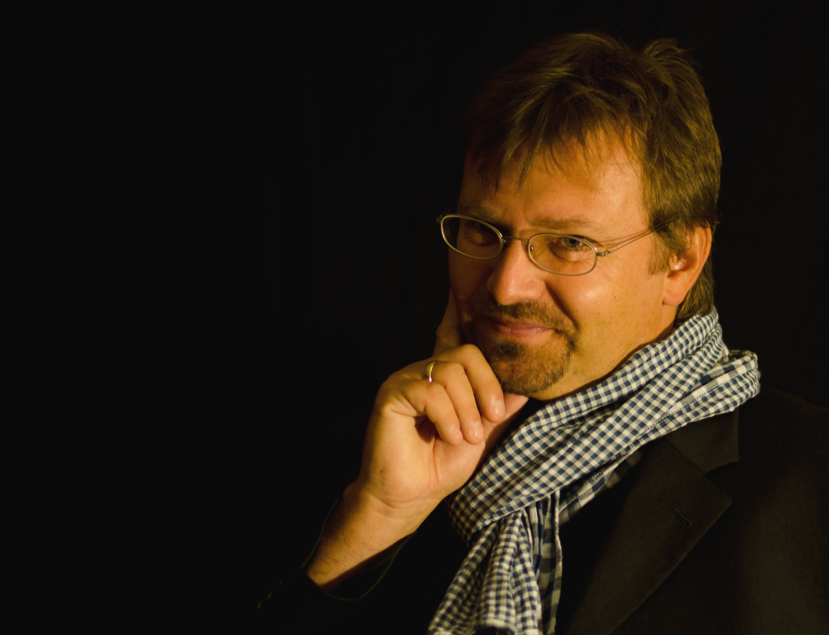 Dieses Portrait-Foto wurde vom Autor zur Verfügung gestellt